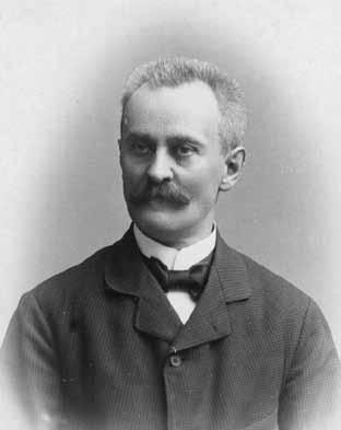 Farkas Gyula (1847-1930) matematikus, kolozsvári egyetem tanár